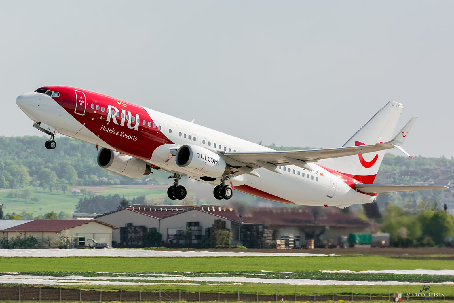 Tui Sonderlackierung Riu Hotels & Resorts